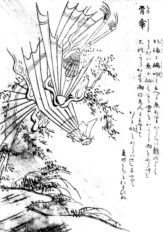 Honekarakasa (骨傘) from the Gazu Hyakki Tsurezure Bukuro (百器徒然袋)